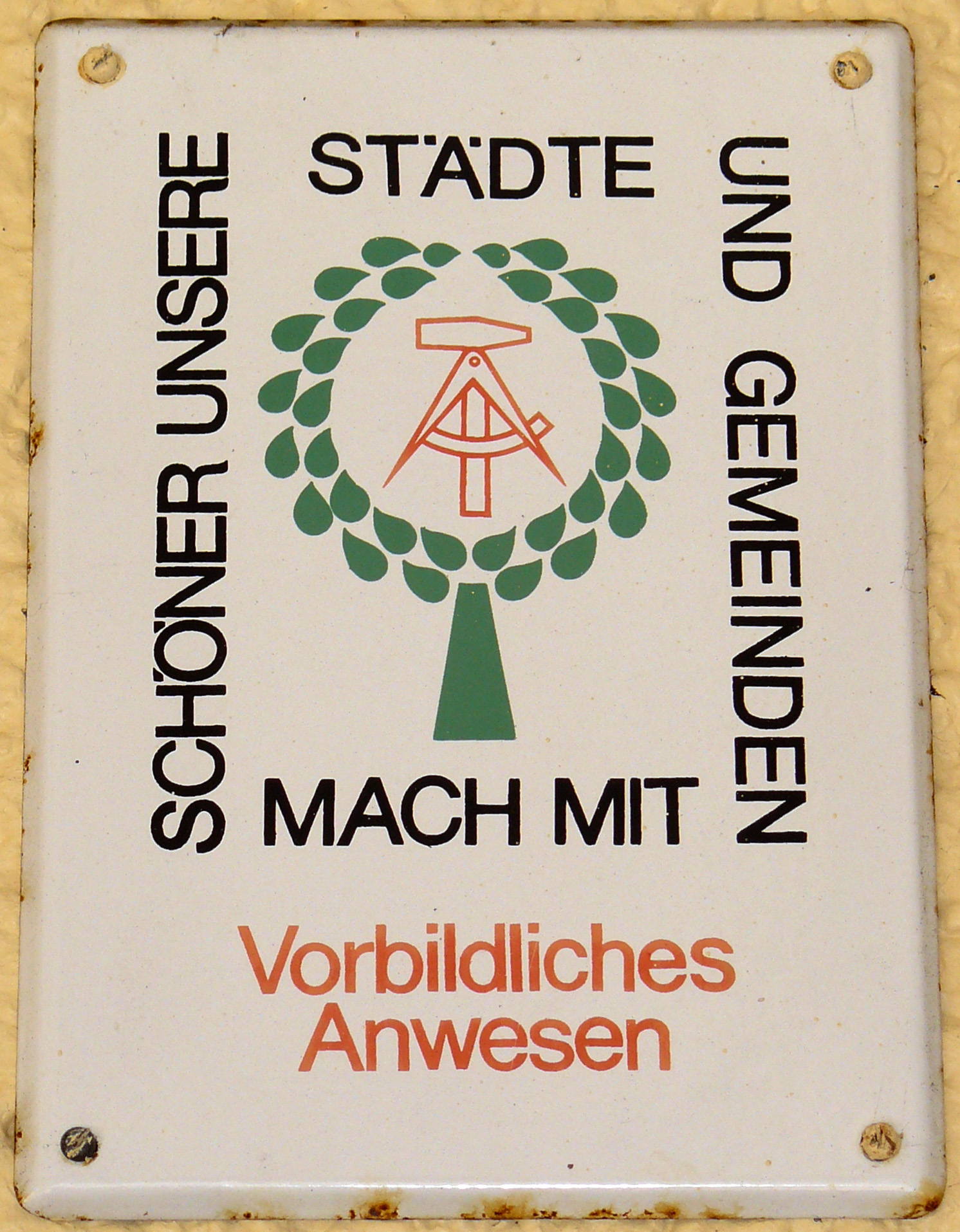 Auszeichnung "VORBILDLICHES ANWESEN" des zu DDR Zeiten üblichen Wettbewerbes "SCHÖNER UNSERE STÄDTE UND GEMEINDEN MACH MIT"